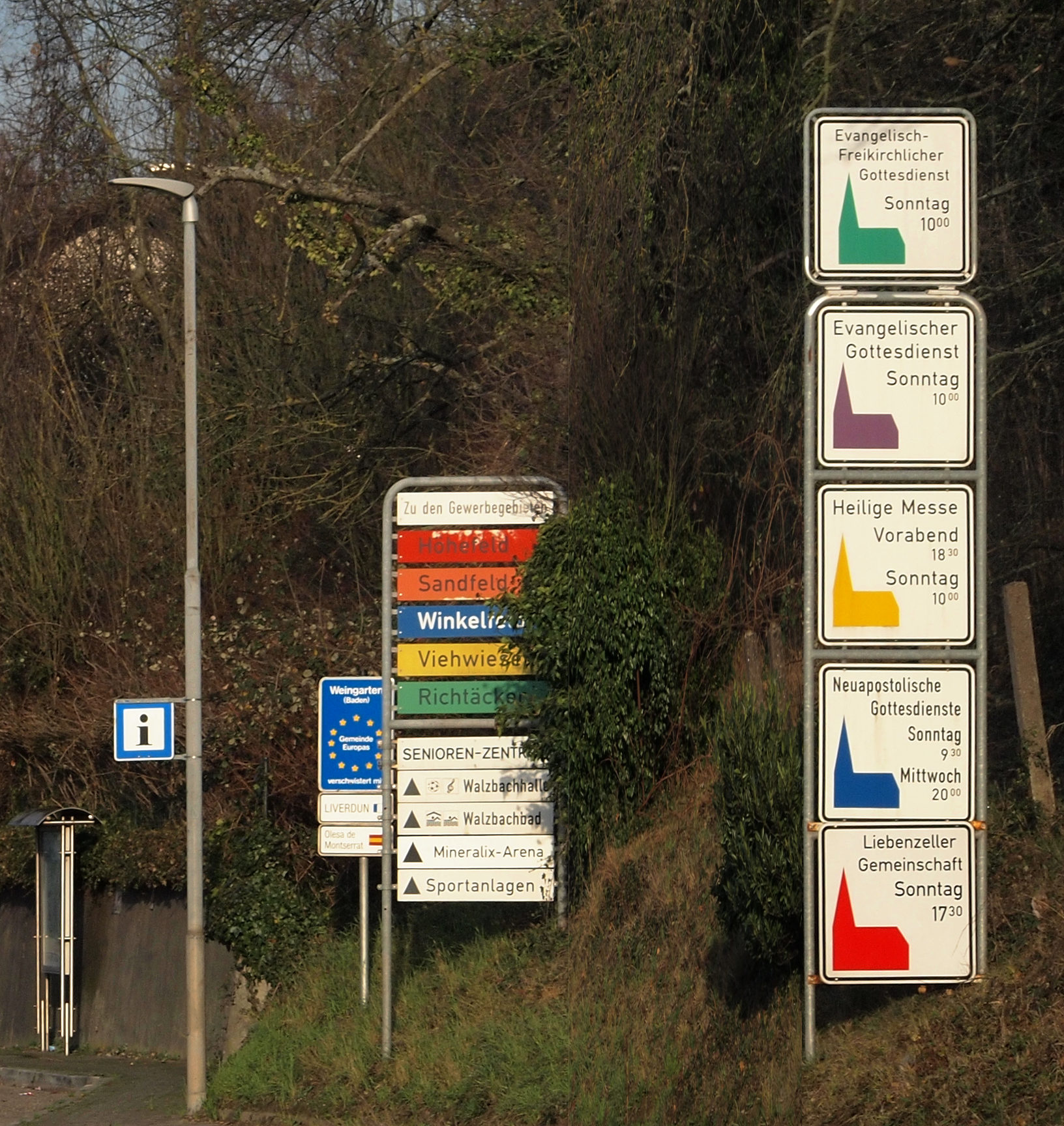 Informationstafeln am Ortseingang von Weingarten, insbesondere fünf Gottesdienstschilder. Ein Wegweiser zur Badischen Spargelstraße steht noch weiter rechts.